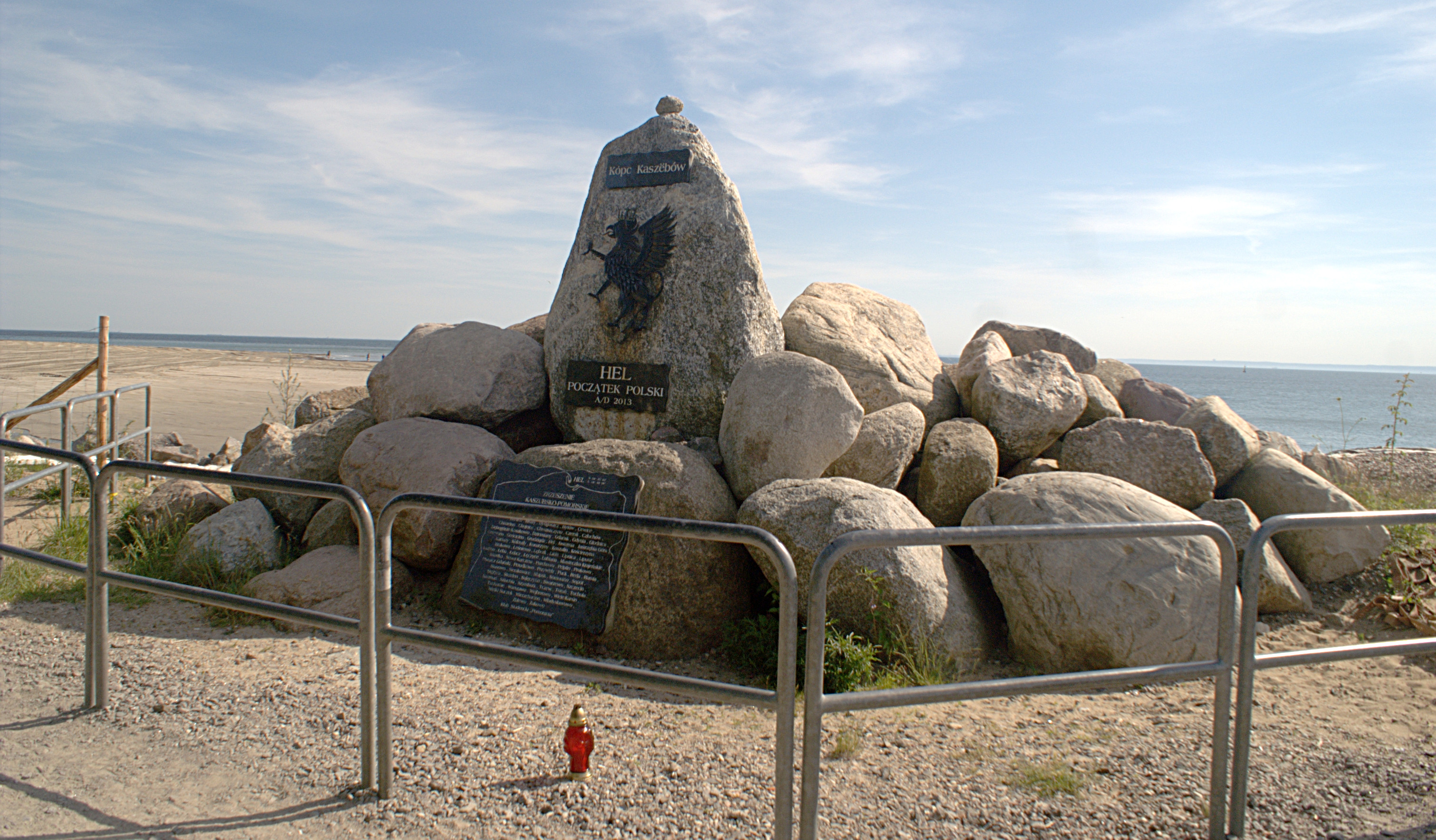 Kopiec Kaszubów